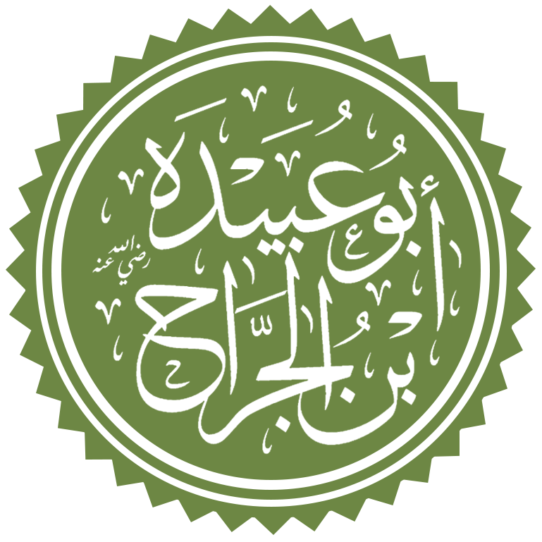 تخطيط اسم أبو عبيدة بن الجراح أمين الأمة رضي الله عنه